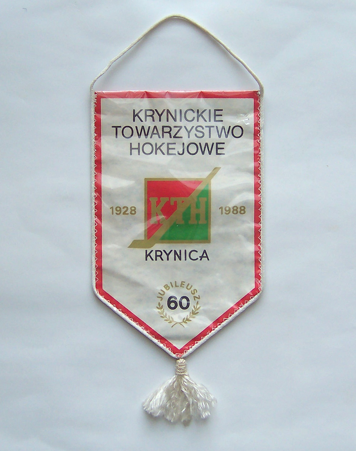 Proporczyk KTH Krynica wydany z okazji jubileuszu 60-lecia istnienia klubu 1928-1988.